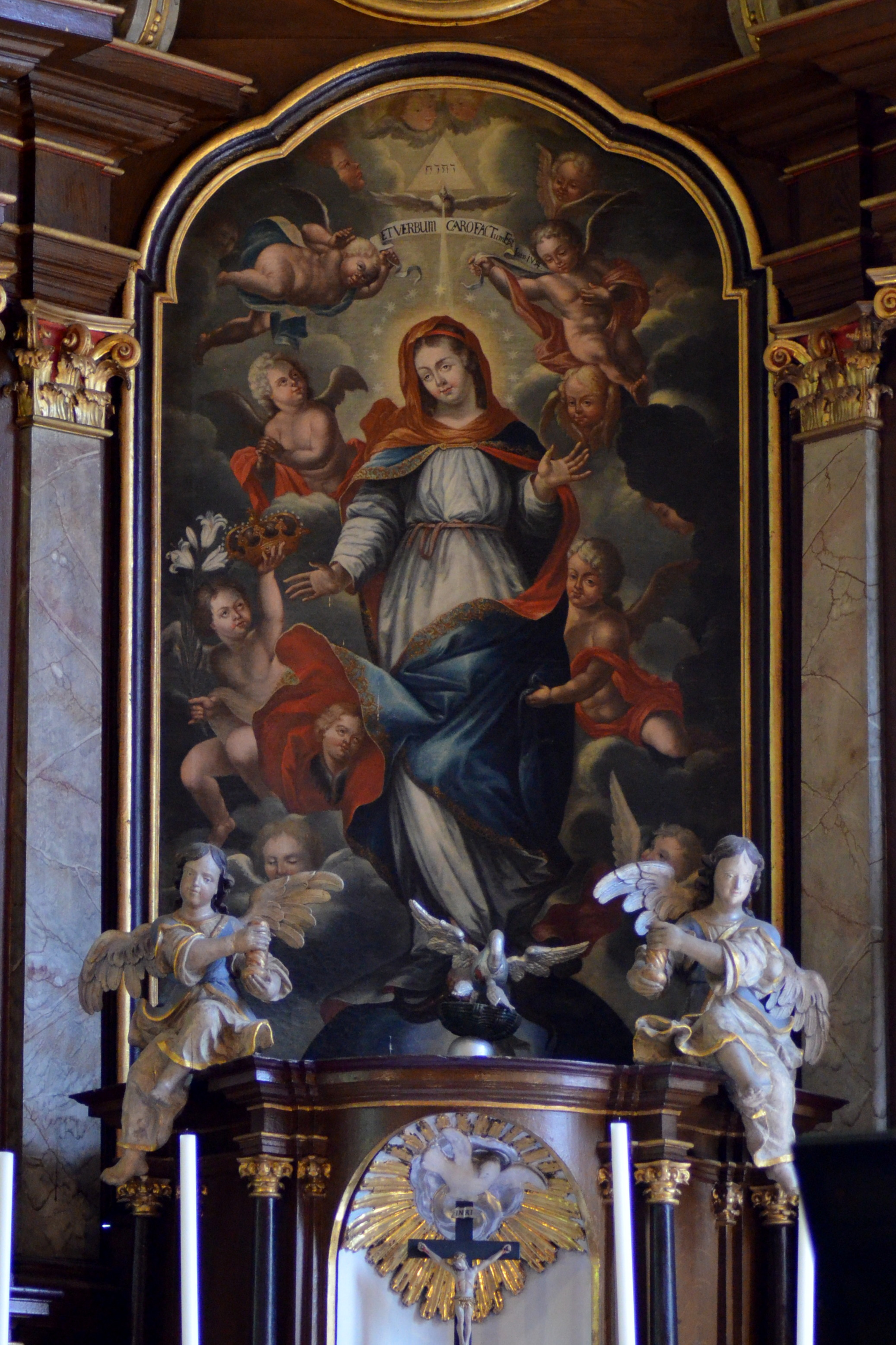 schilderij hoofdaltaar